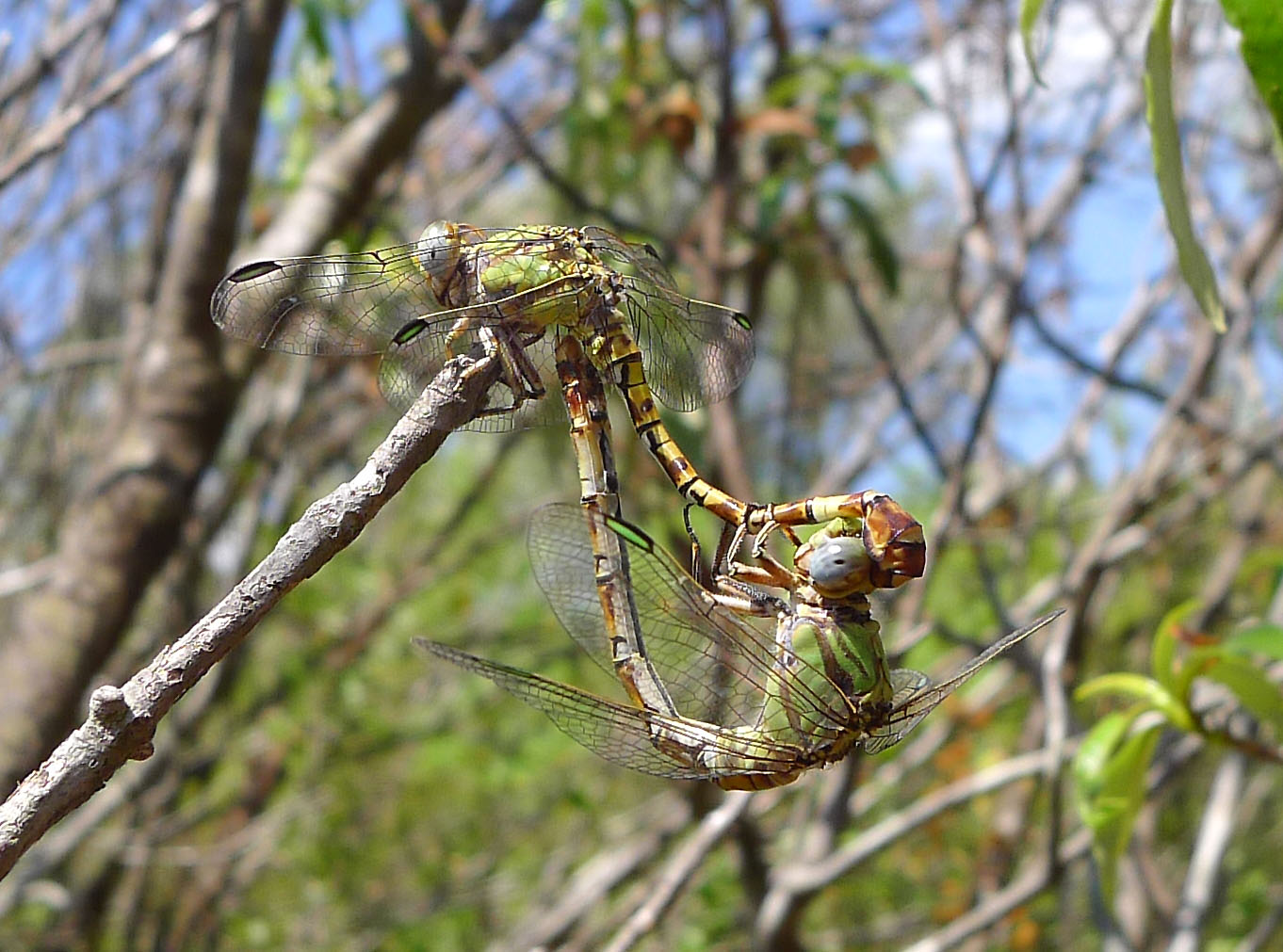 Green Hooktail. Paragomphus genei.